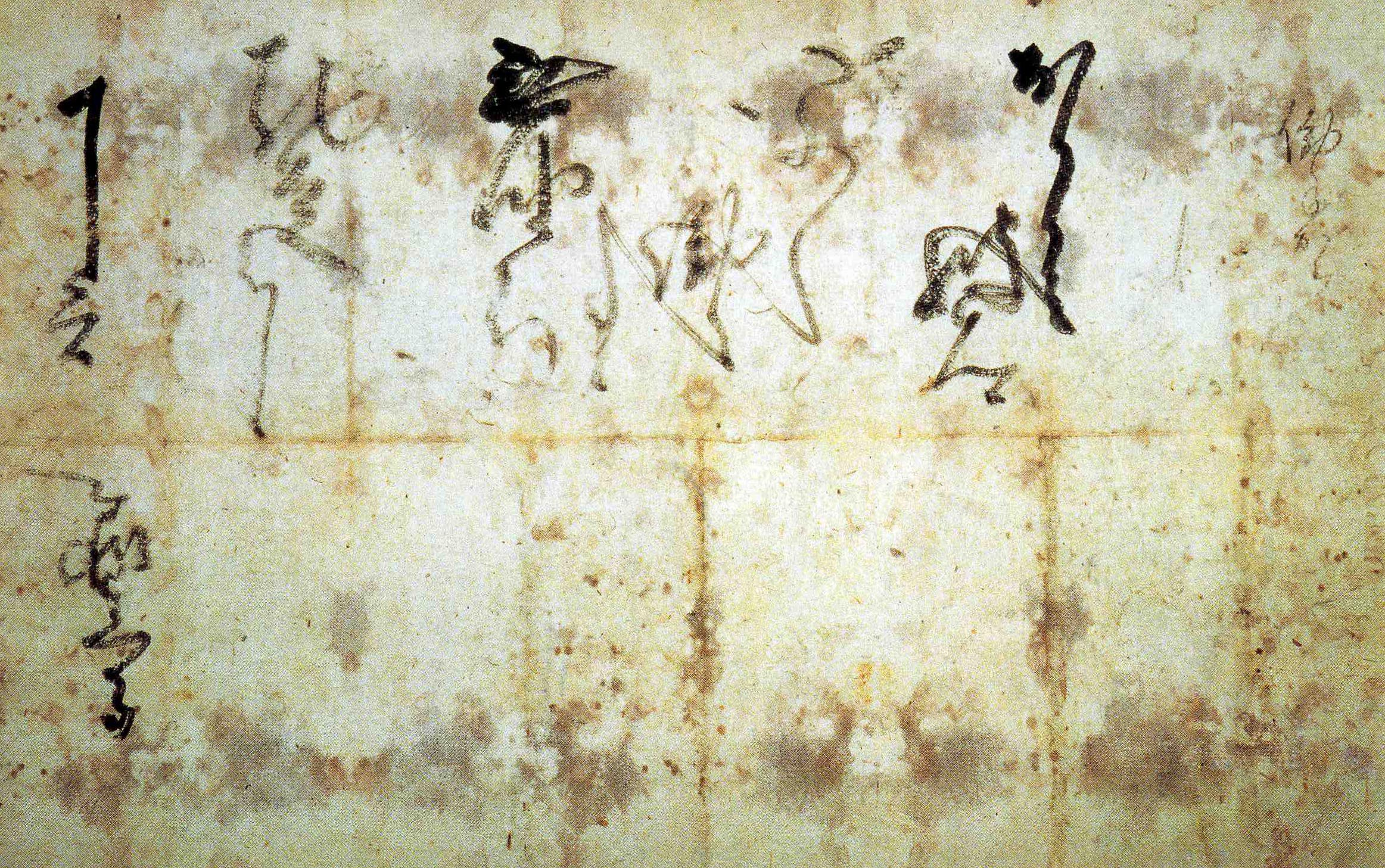 織田信長実筆感状